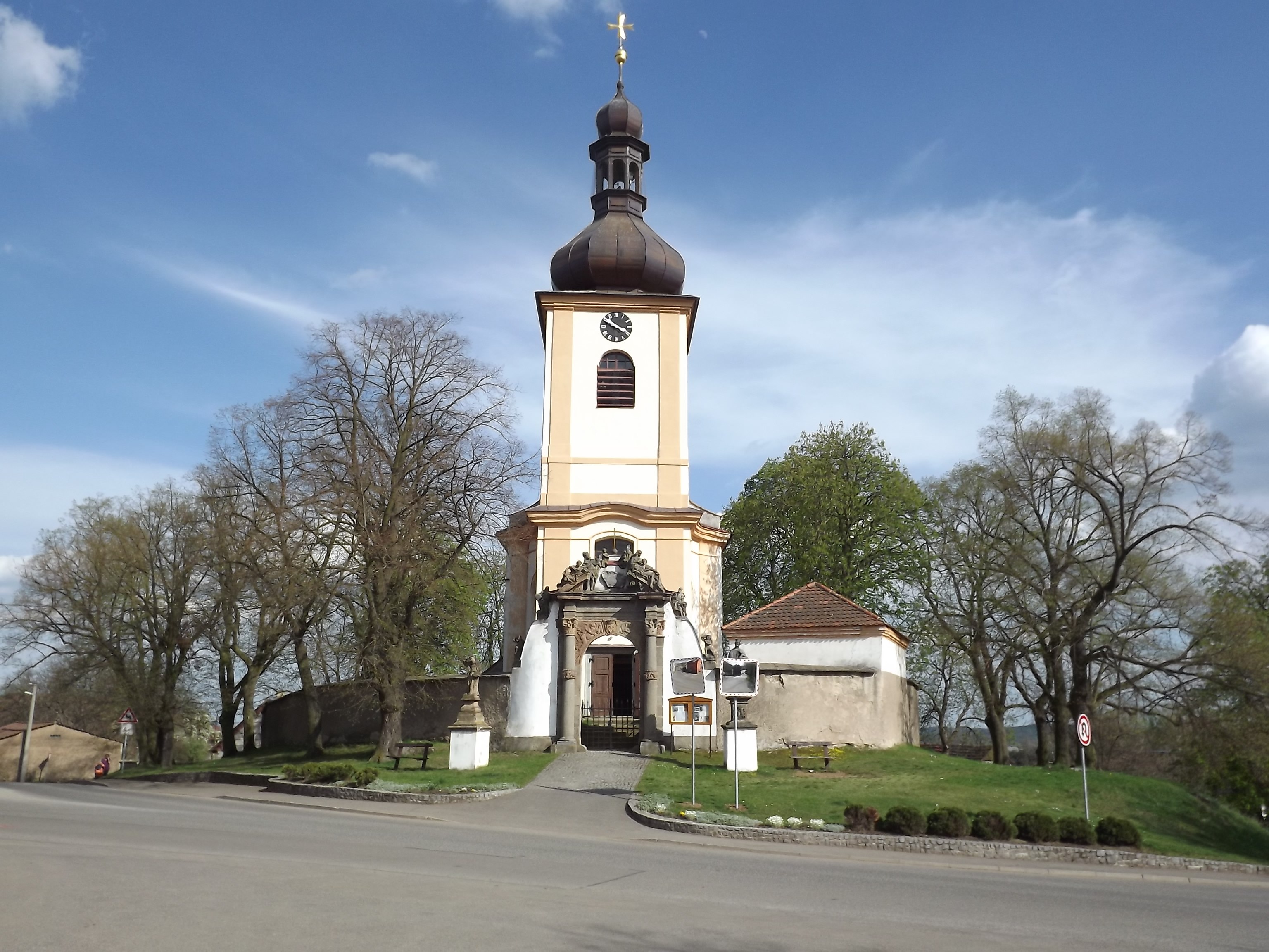 Kostel Nanebevzetí P. Marie (Pičín)